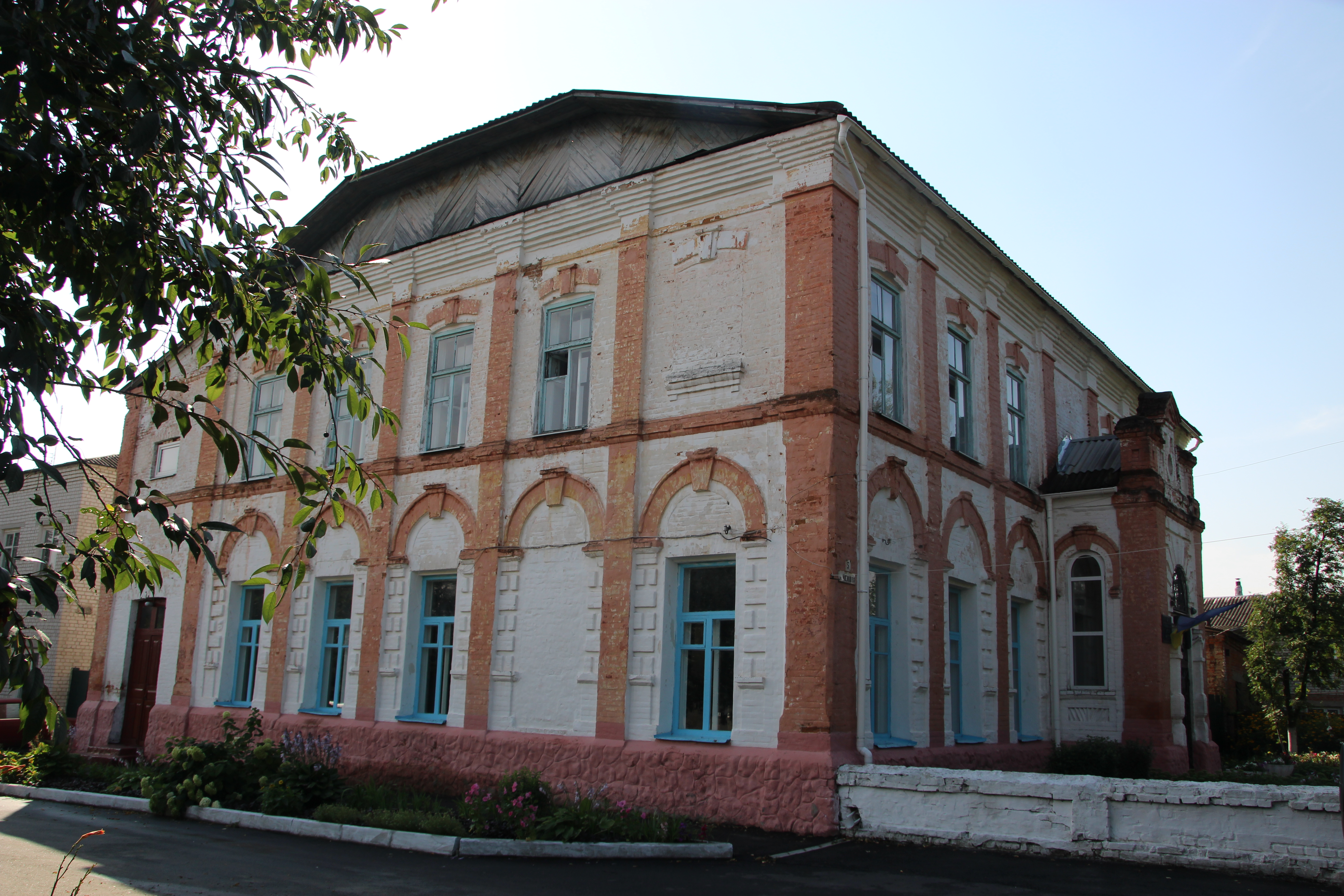 Синагога (мур.), Кролевець, вул. Чехова, 5, вул. Радянська, 23